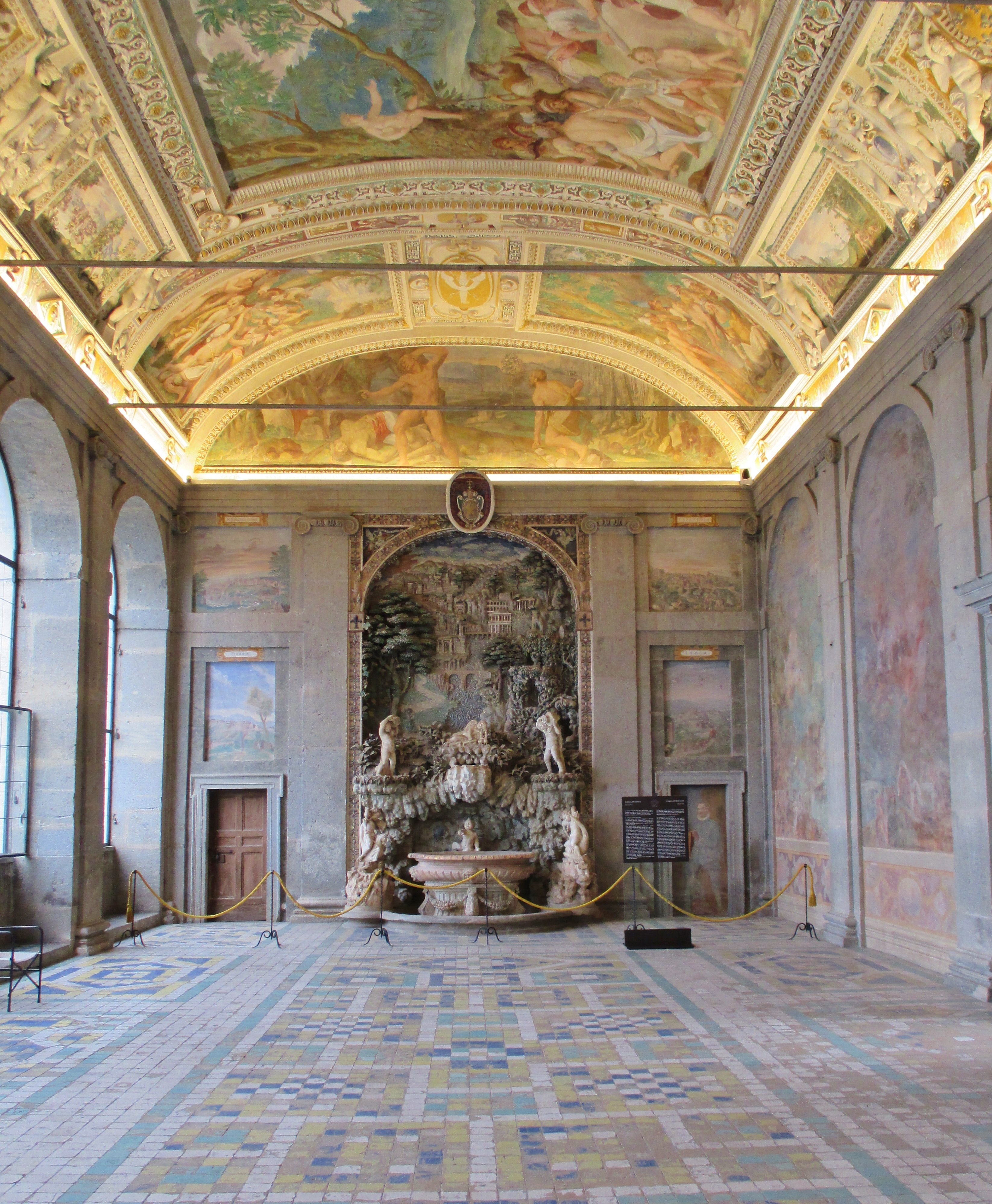 Caprarola, villa Farnese: interno della loggia.